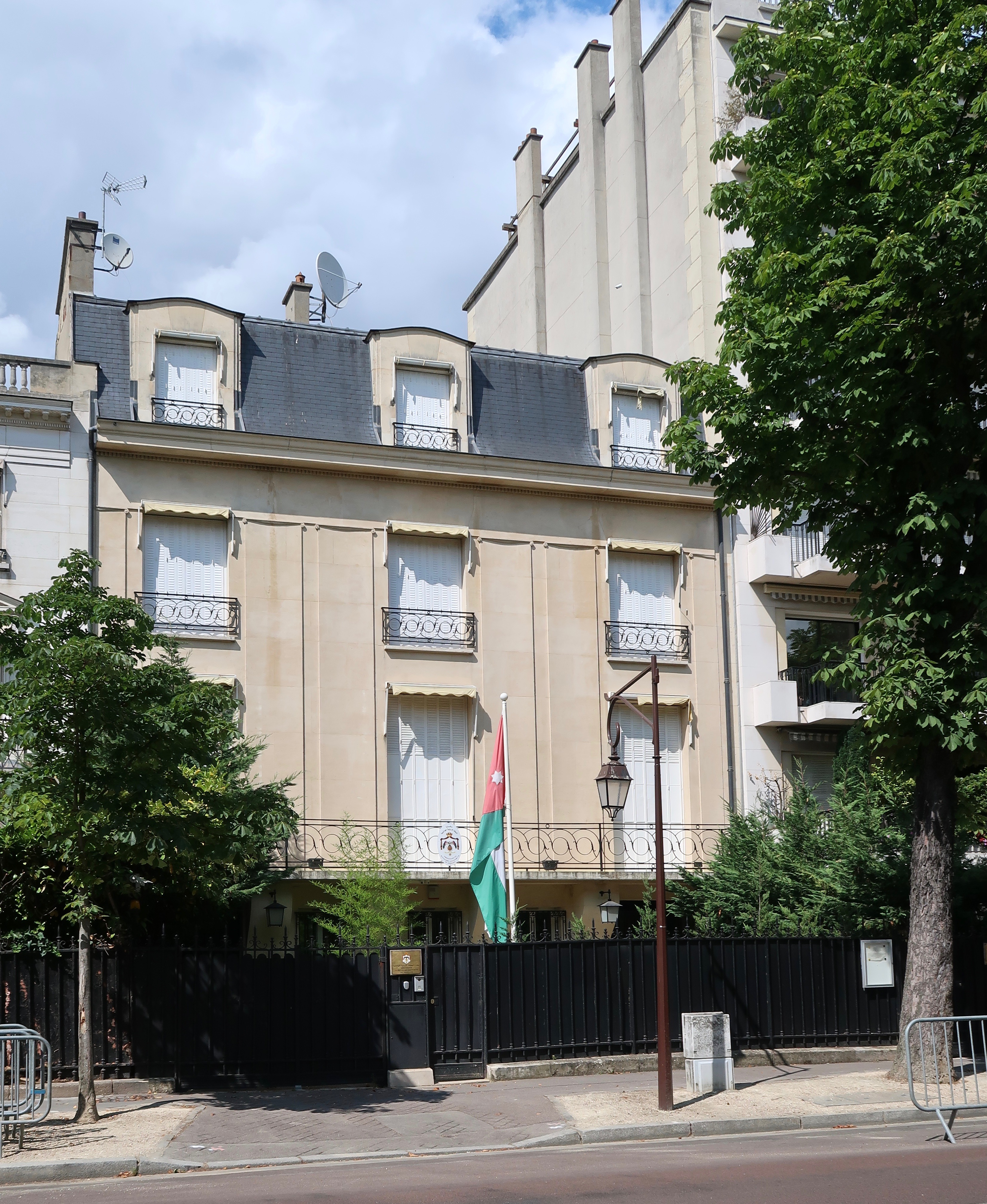 Ambassade de Jordanie en France, 80 boulevard Maurice-Barrès, Neuilly-sur-Seine (Hauts-de-Seine).